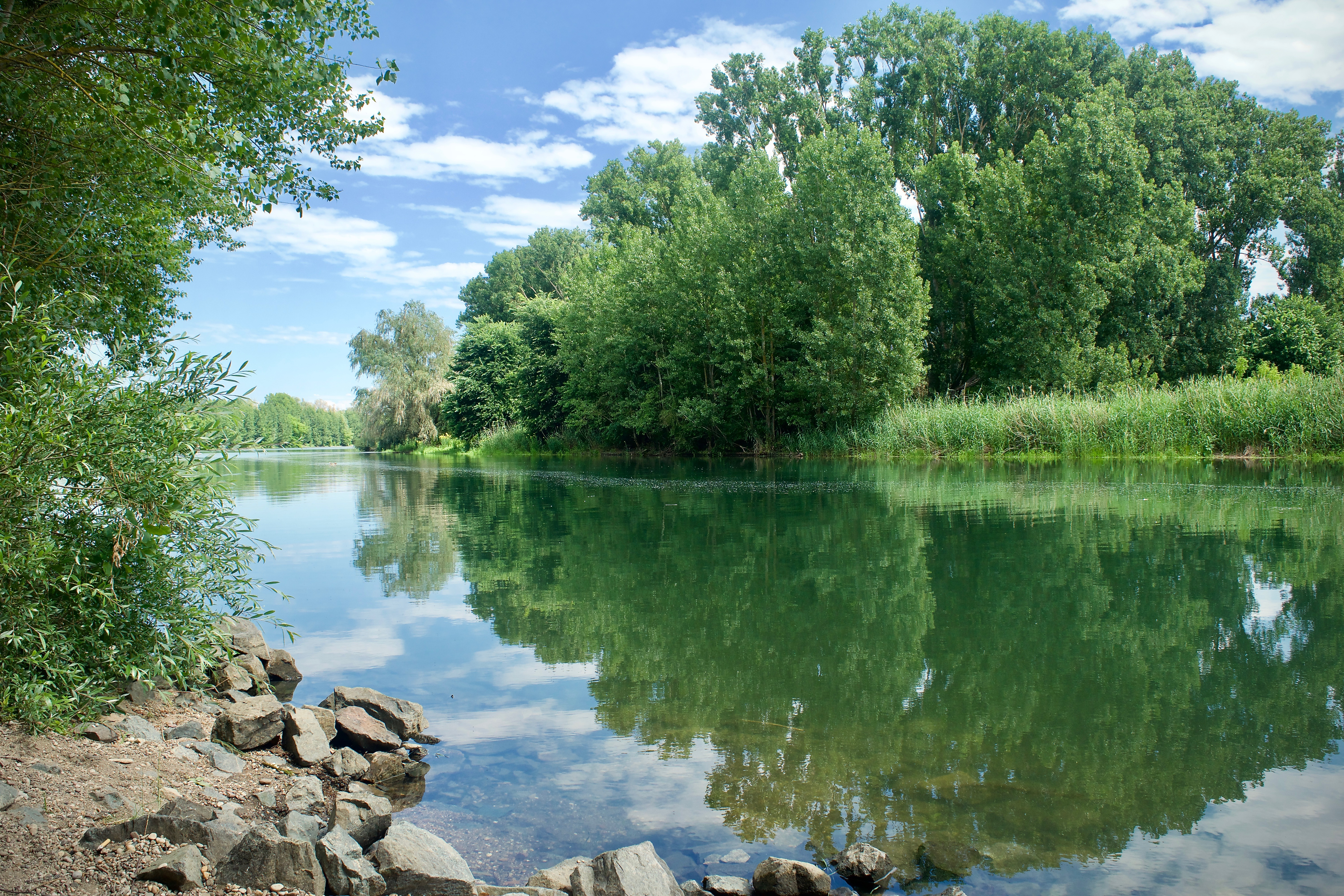 Inicio del verano en el territorio de Flora, Fauna y Hábitat Bruderlöcher en Hessen, Alemania.